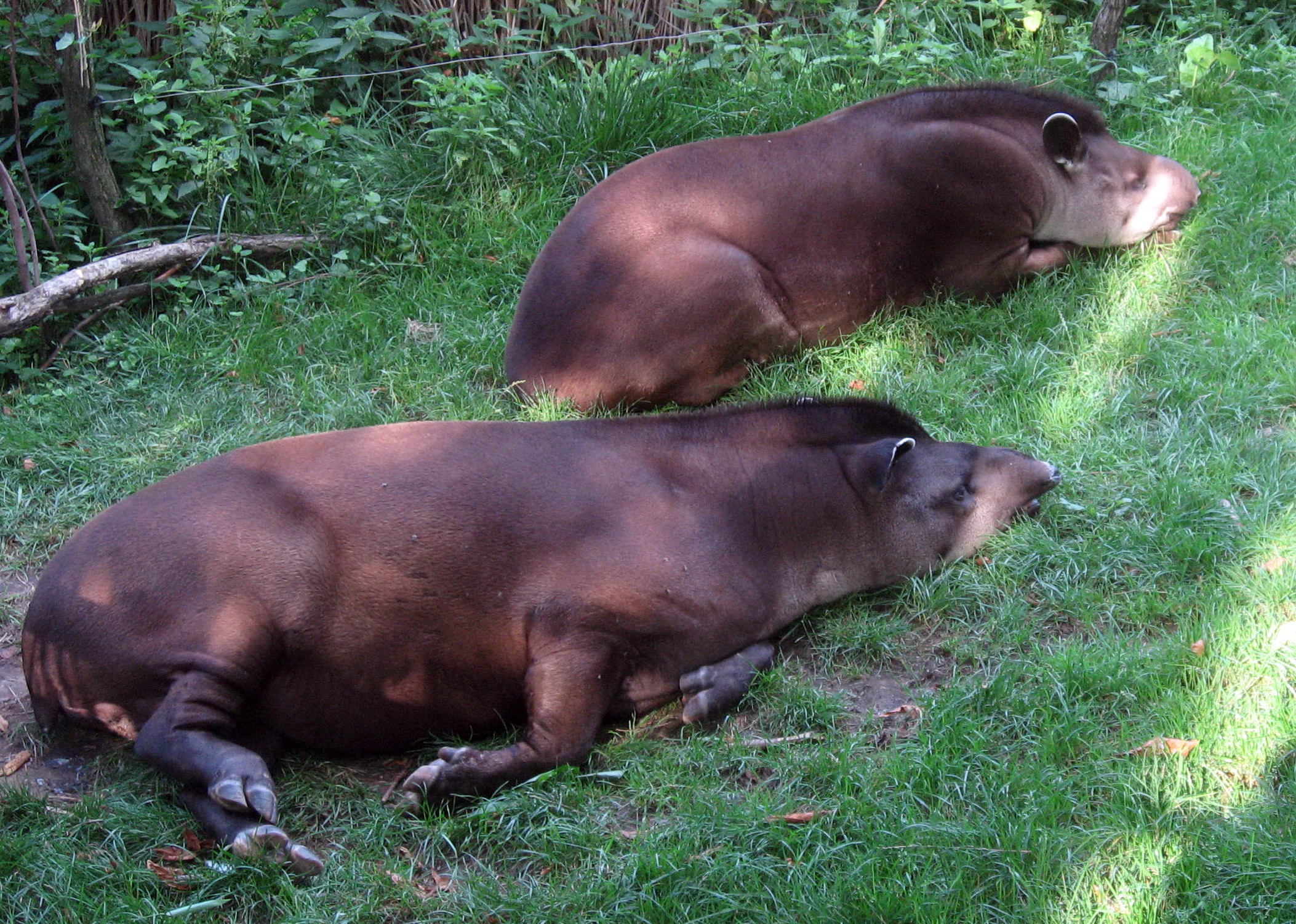 Tapír jihoamerický